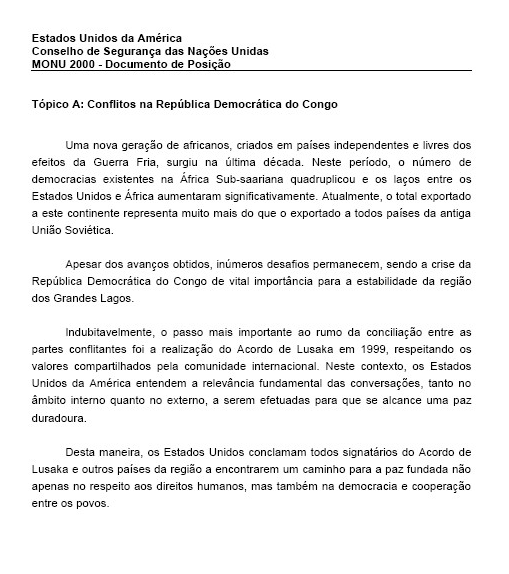 Modelo de documento de posição para uma simulação de organização internacional.